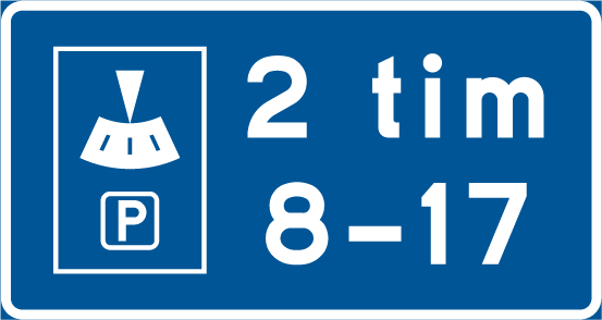 Tilläggskylt för användandet an p-skiva